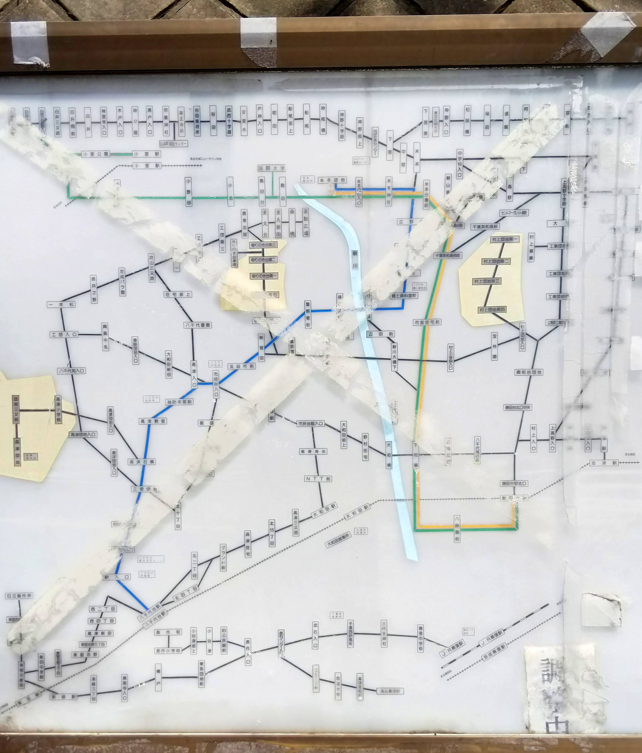 過去の東洋バスの路線図